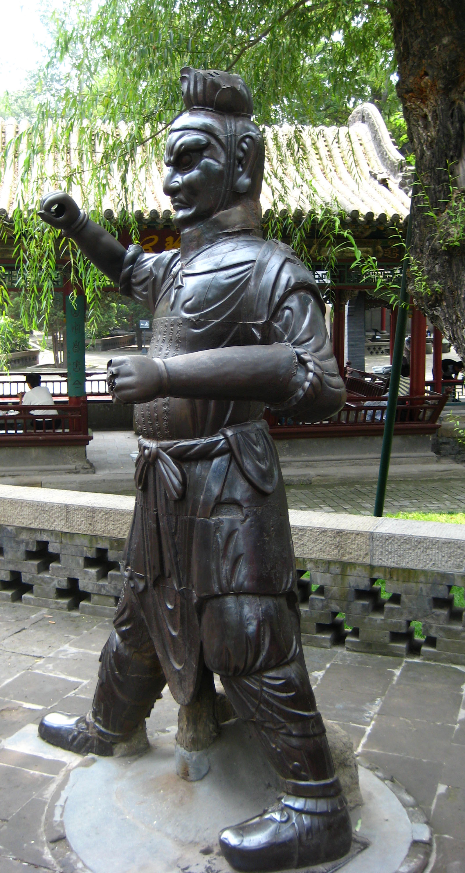 晋祠宋代铁人